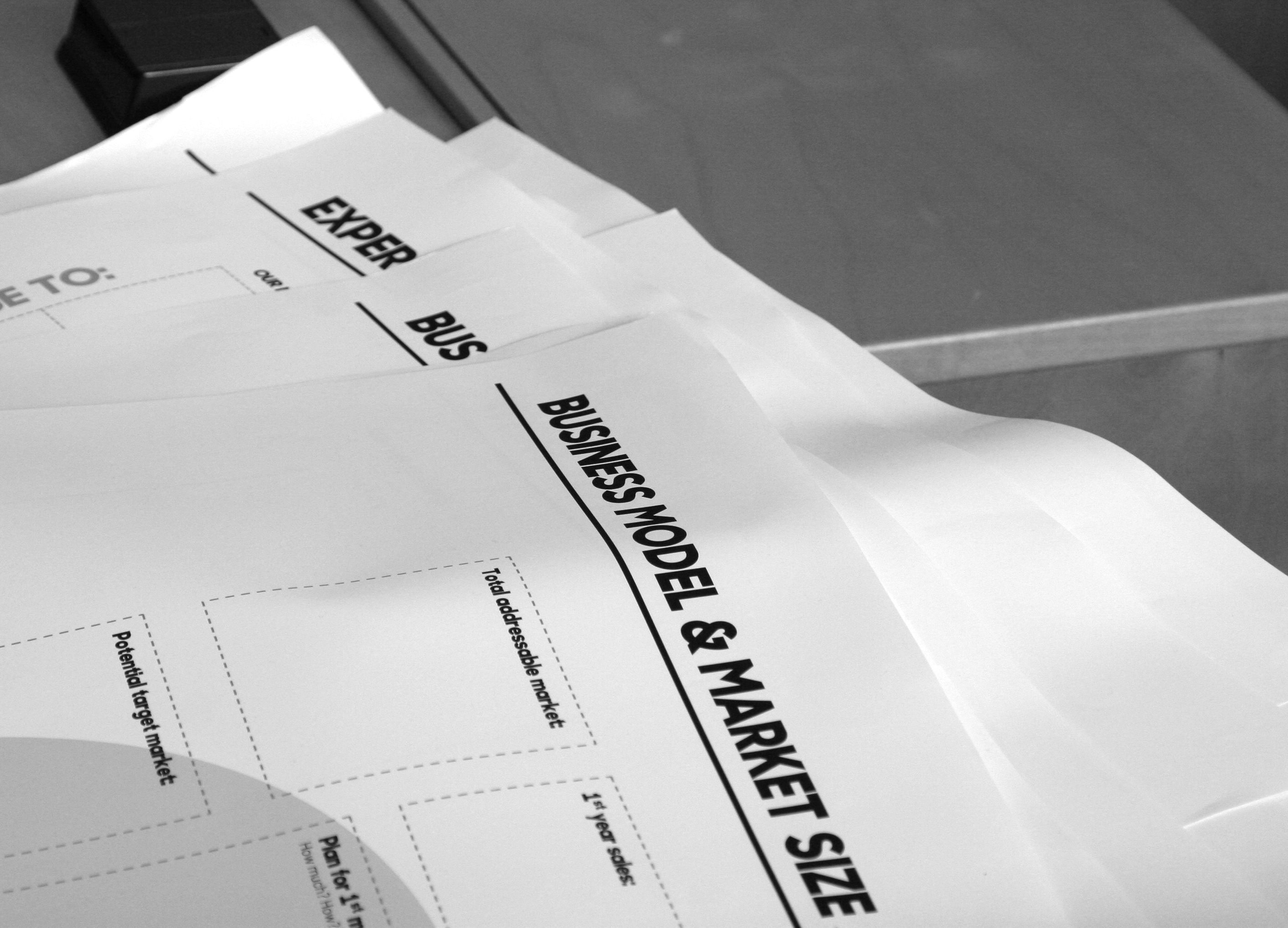 Lean Service Creation -työskentelypohjia.